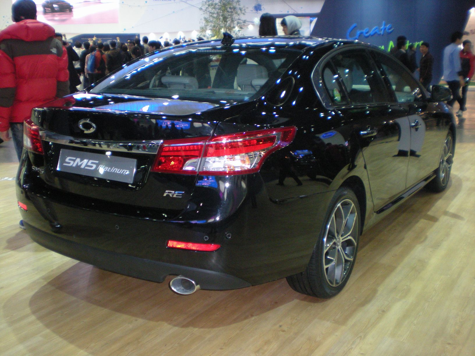 ルノーサムスン・SM5